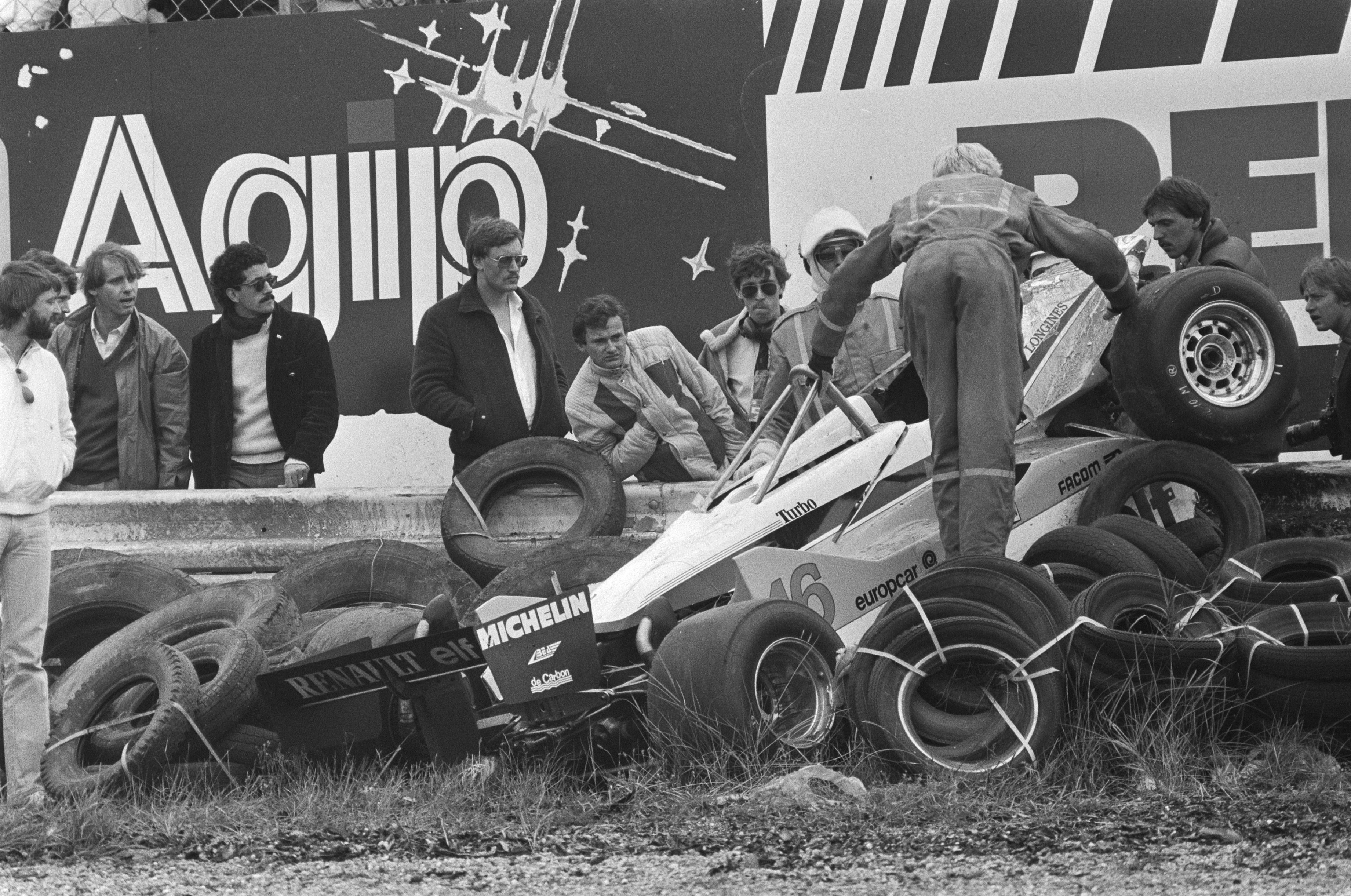 Grand Prix van Nederland te Zandvoort; wagen van Rene Arnoux in vangrail.